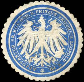 Sealing stamp Title: Adjutantur Seiner Königlichen Hoheit des Prinzen Friedrich Leopold von Preussen Description: blau, weiß, geprägt Place: size: 4 cm